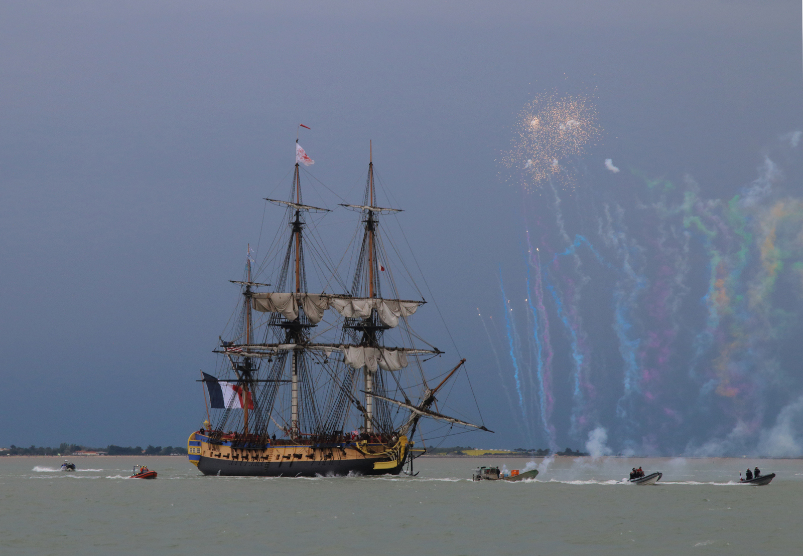 Départ de l'Hermione vers l'Amérique